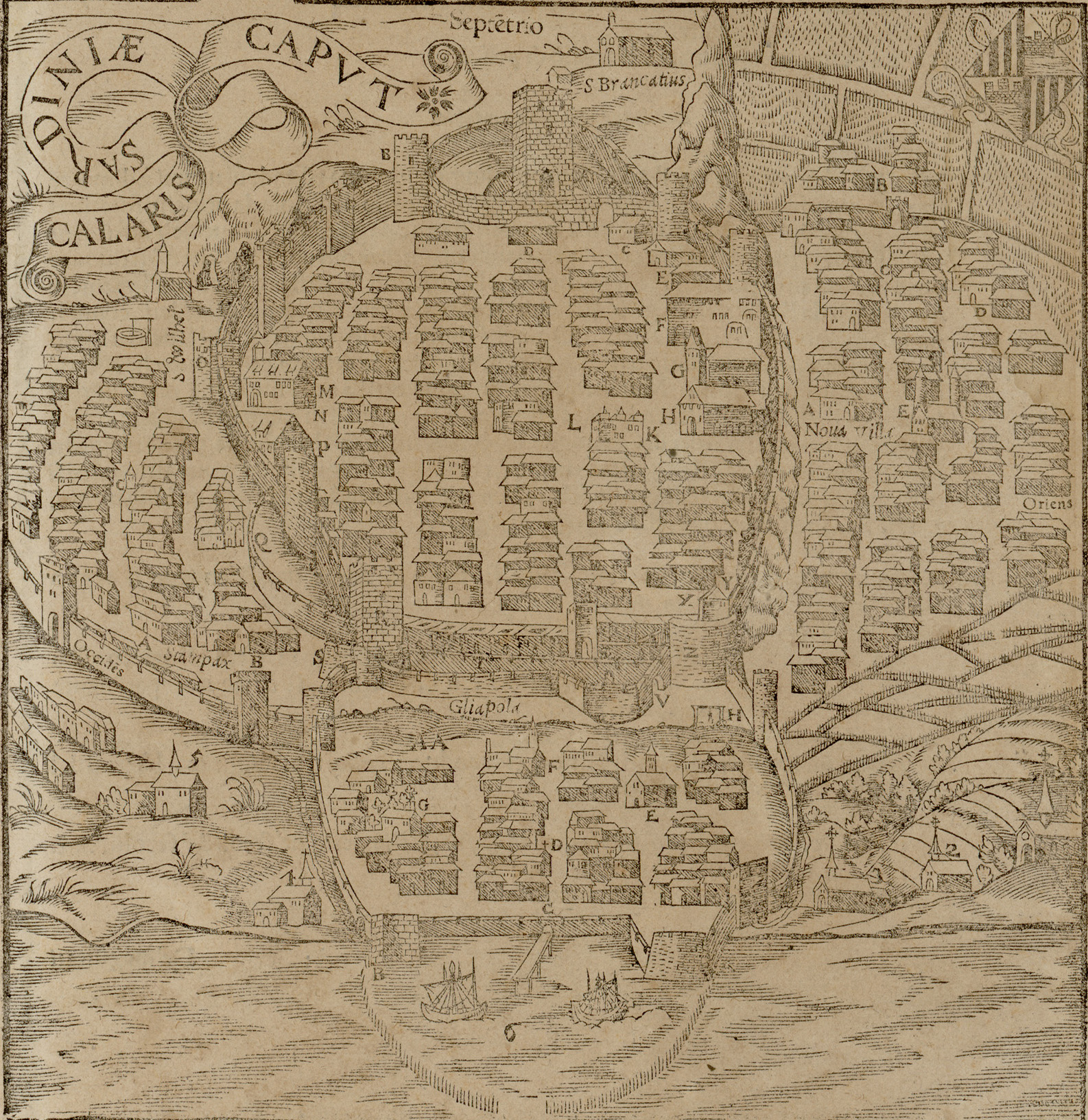 Pianta di Cagliari in Cosmographia Universale di Sebastian Münster, opera pubblicata a Colonia nel 1575